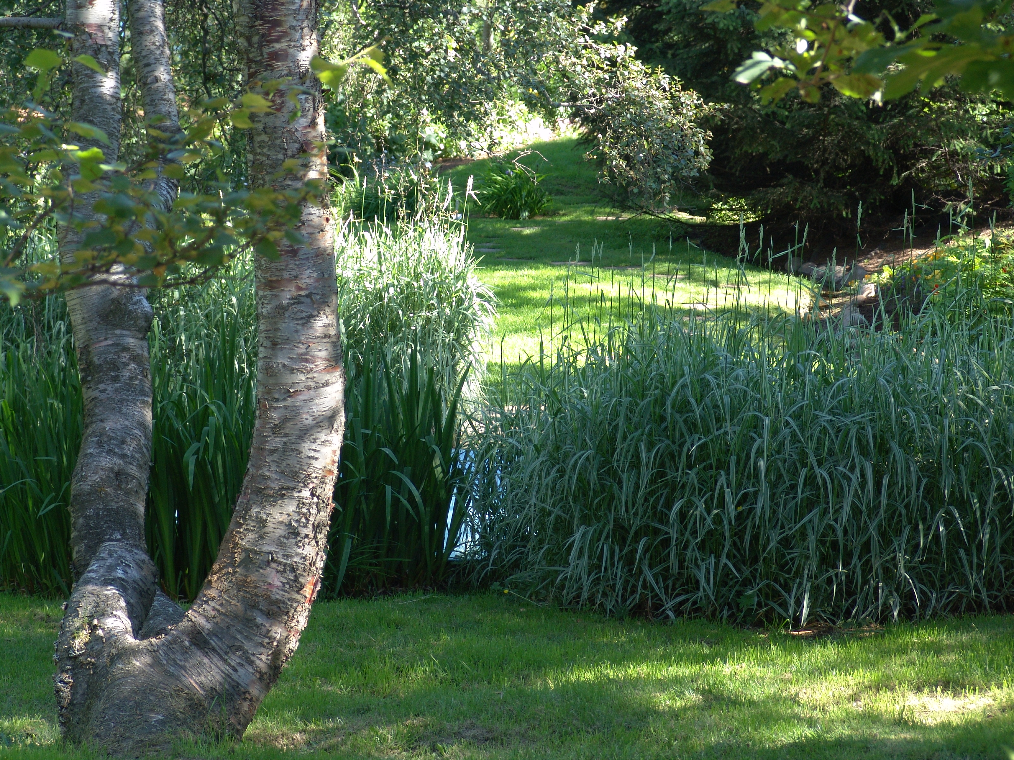 Island, Botanischer Garten Akureyri.